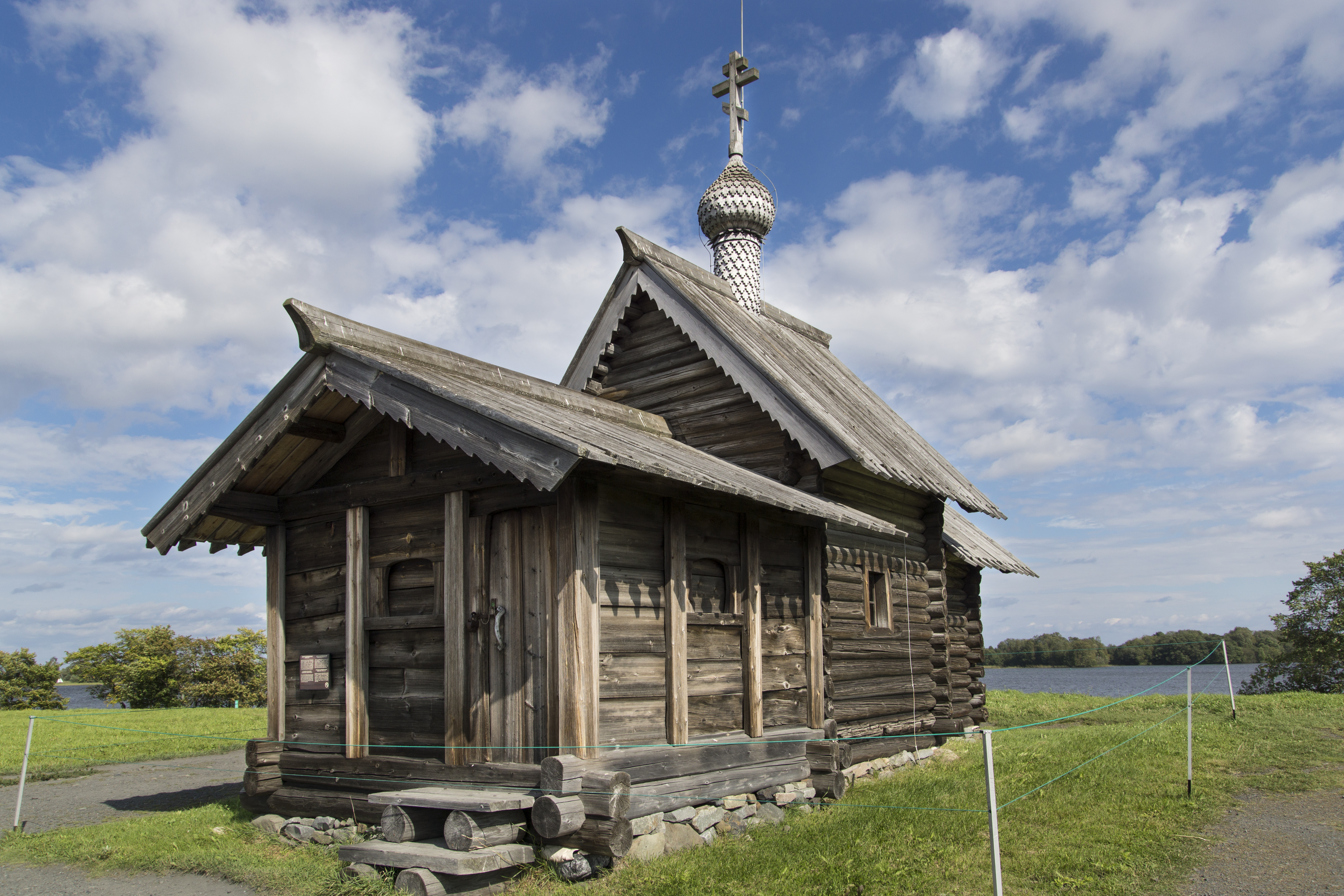 ЦЕРКОВЬ ВОСКРЕШЕНИЯ ЛАЗАРЯ - МУЗЕЙ-ЗАПОВЕДНИК ДЕРЕВЯННОГО ЗОДЧЕСТВА "КИЖИ"